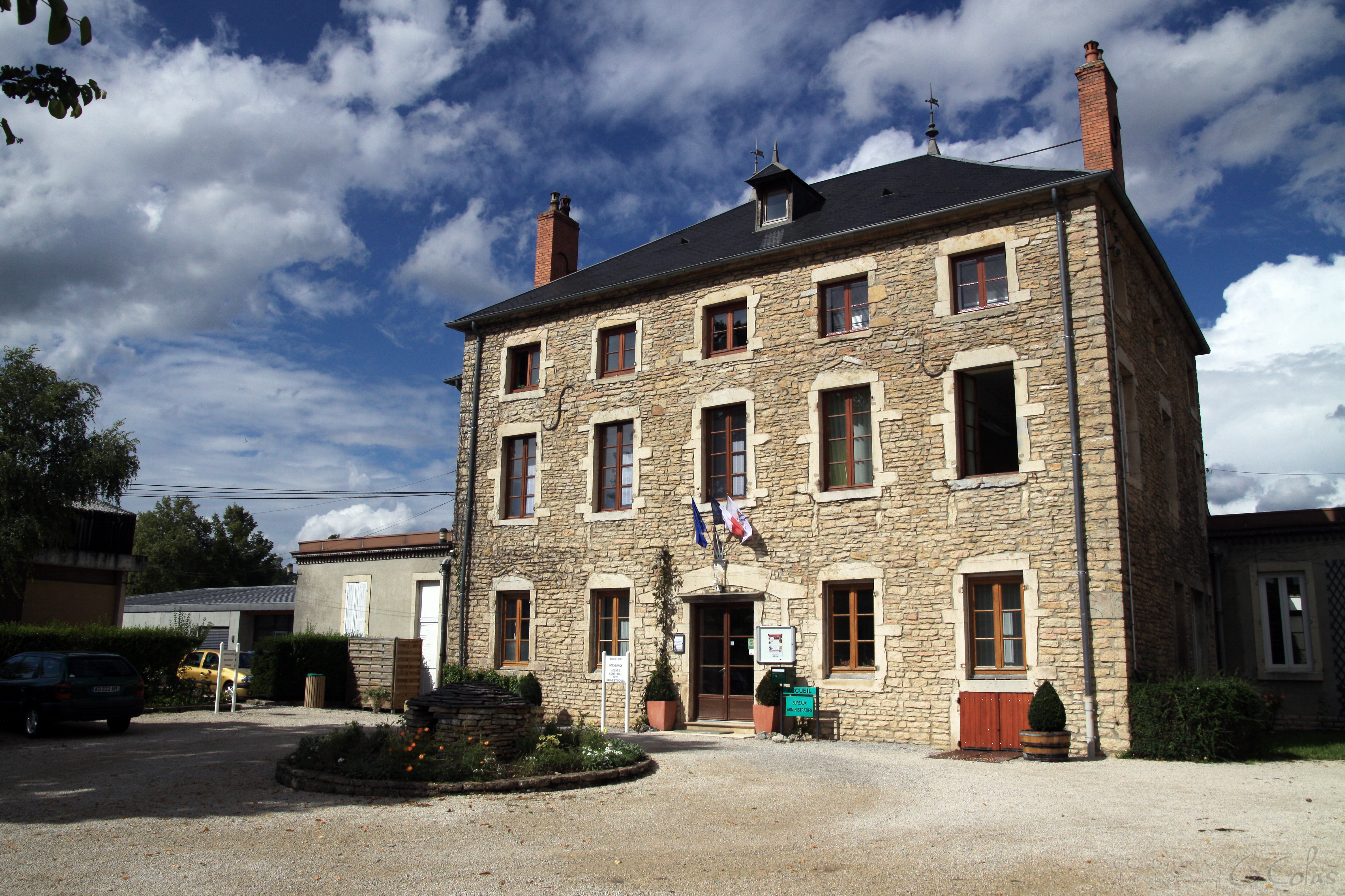 La Viti de Beaune, Batiment administratif